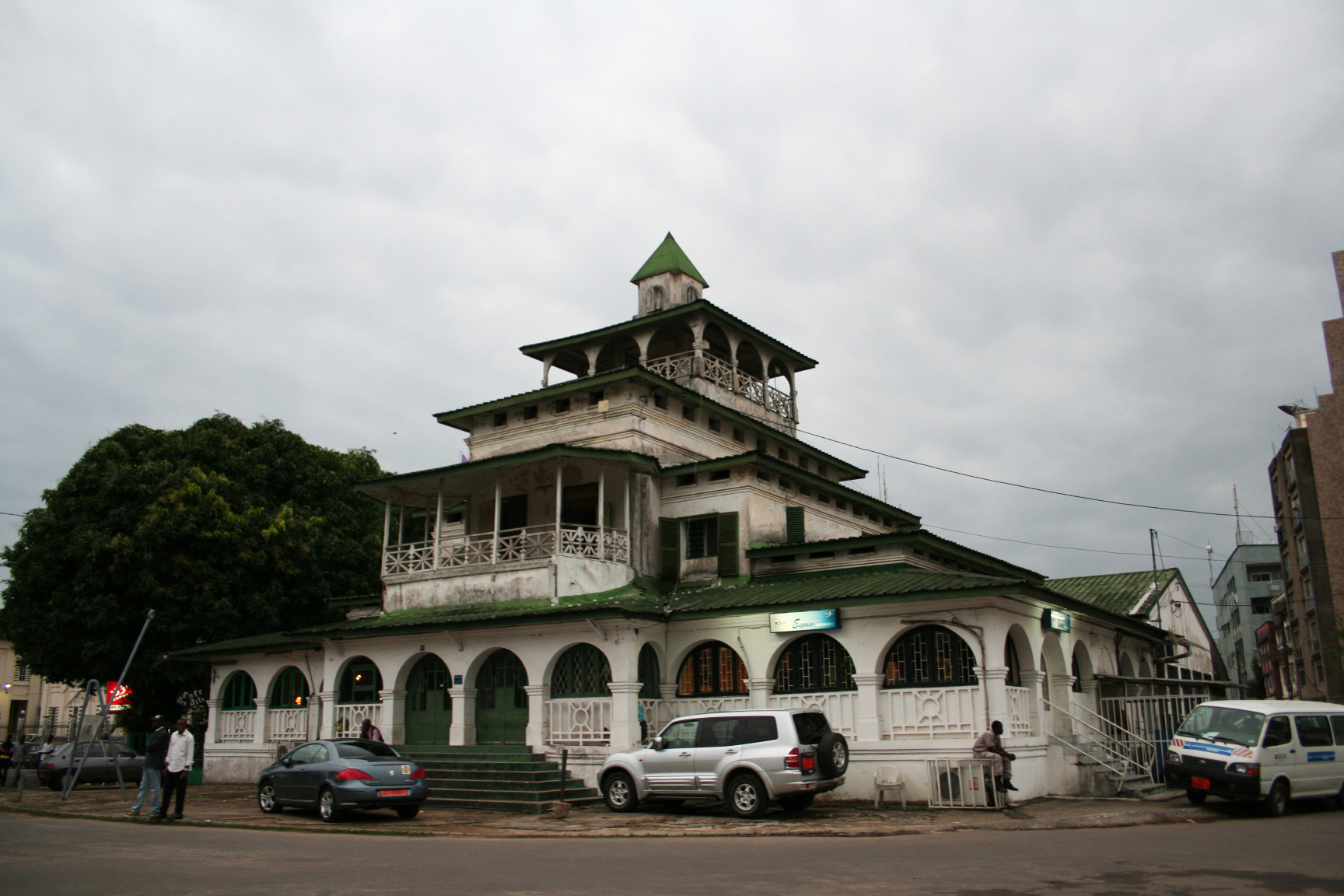 Palais des rois Bell